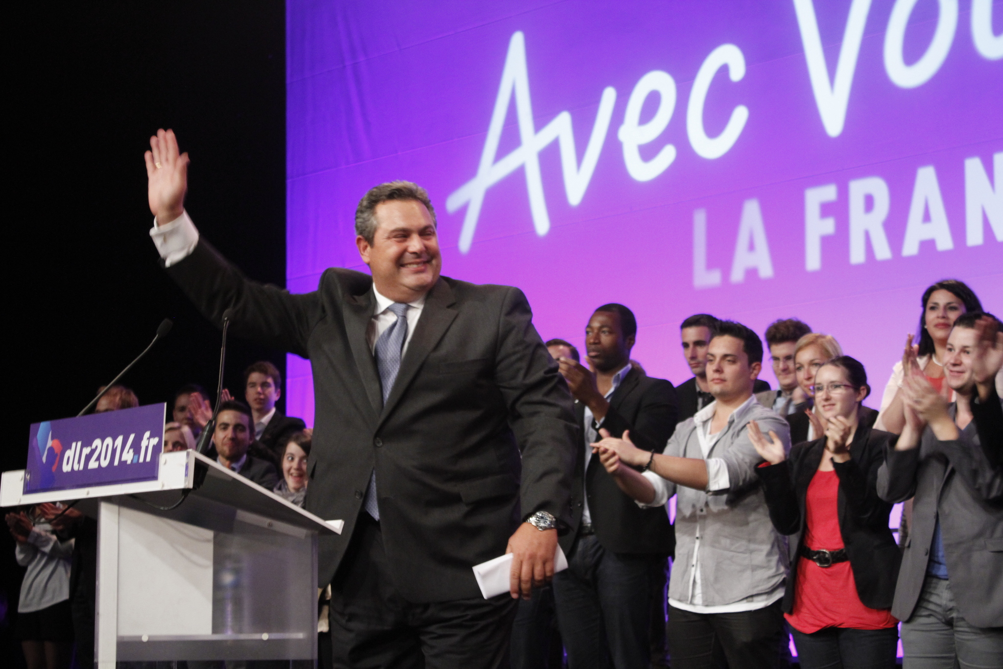 Panos Kammenos, ministre de la défense en Grèce, au congrès de Debout la République en 2013